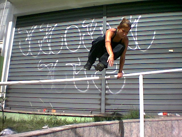 Mulher também manda bem!